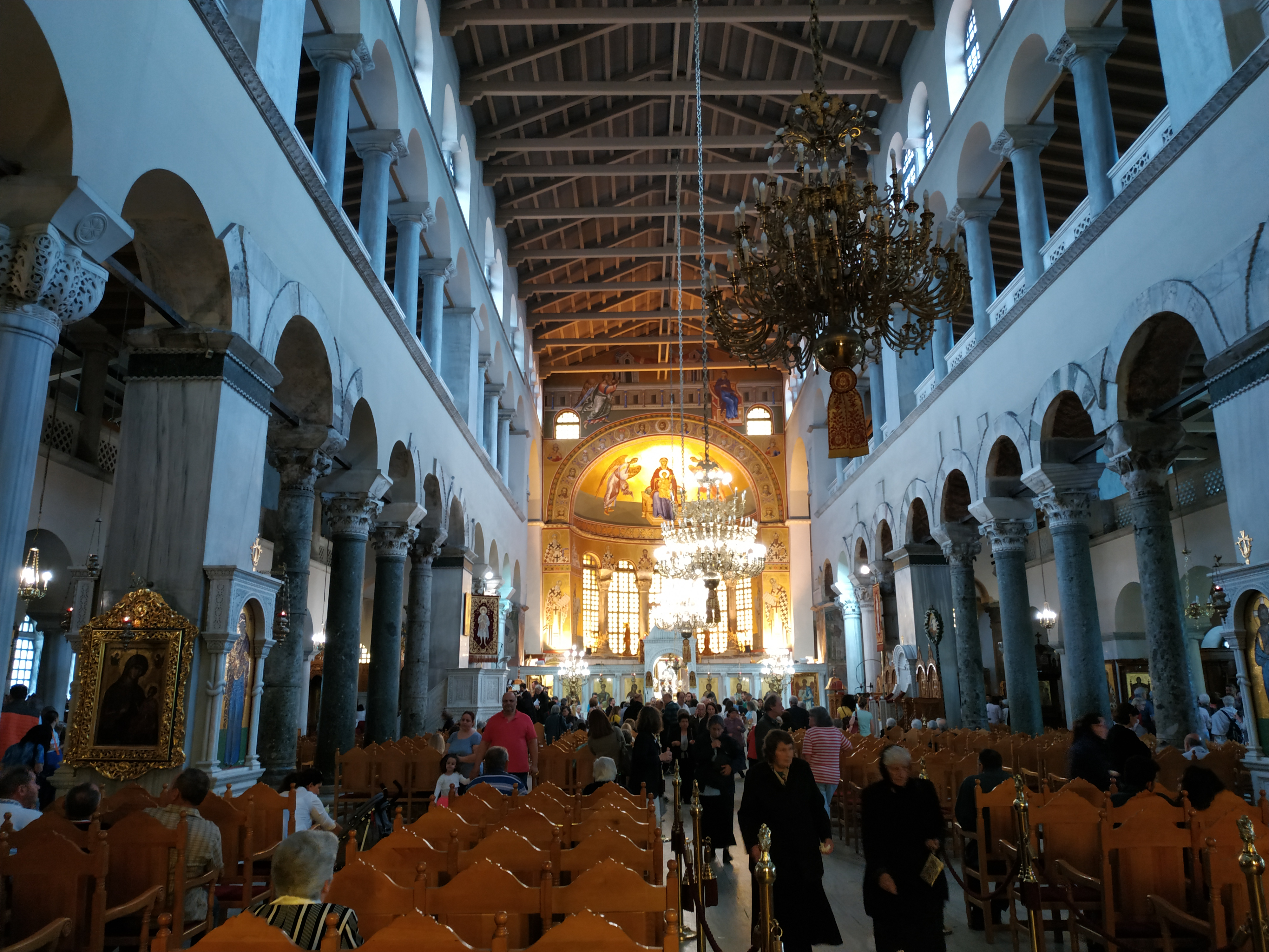 Храм св. Димитрія